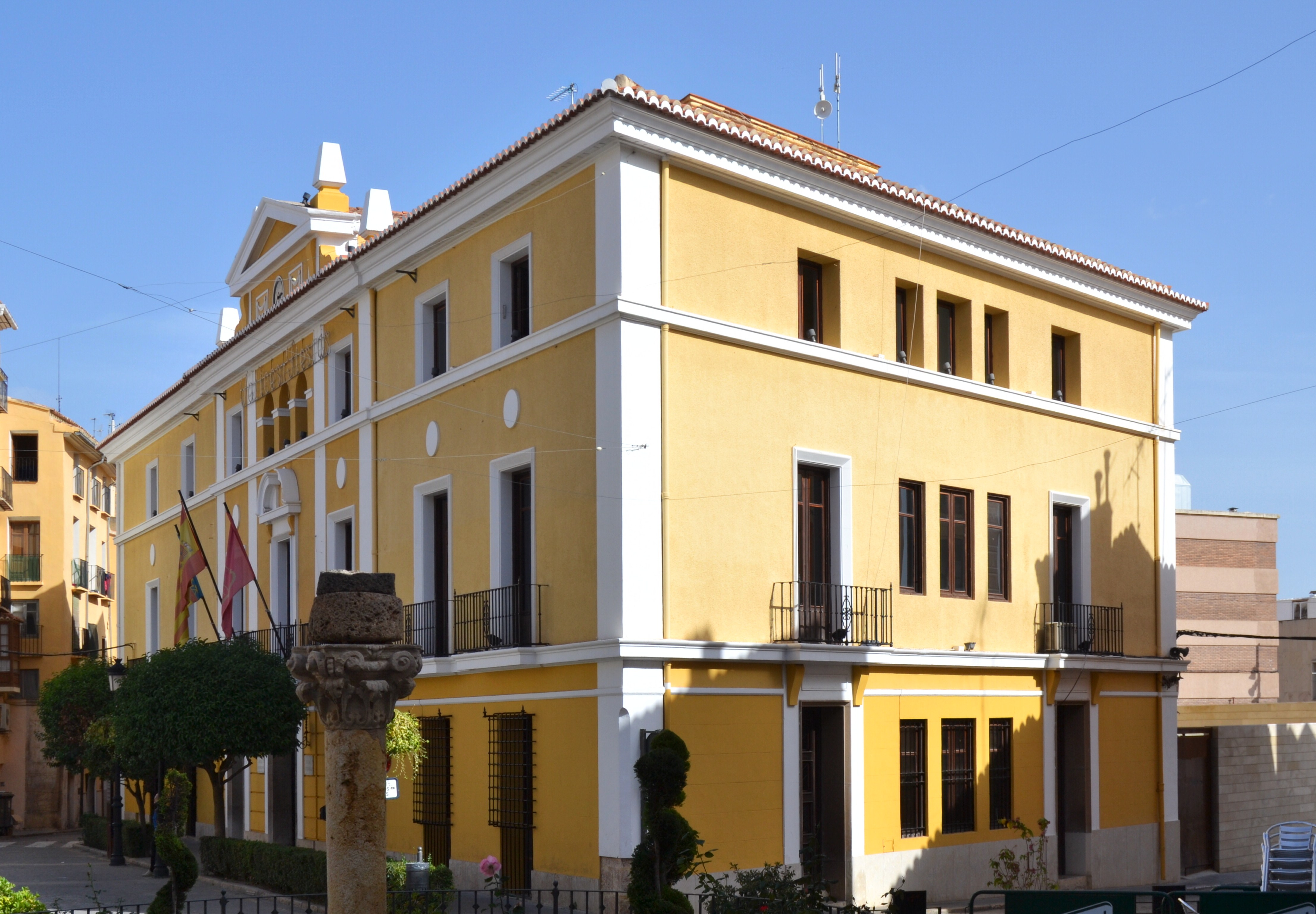 Ajuntament de Sogorb, Alt Palància.